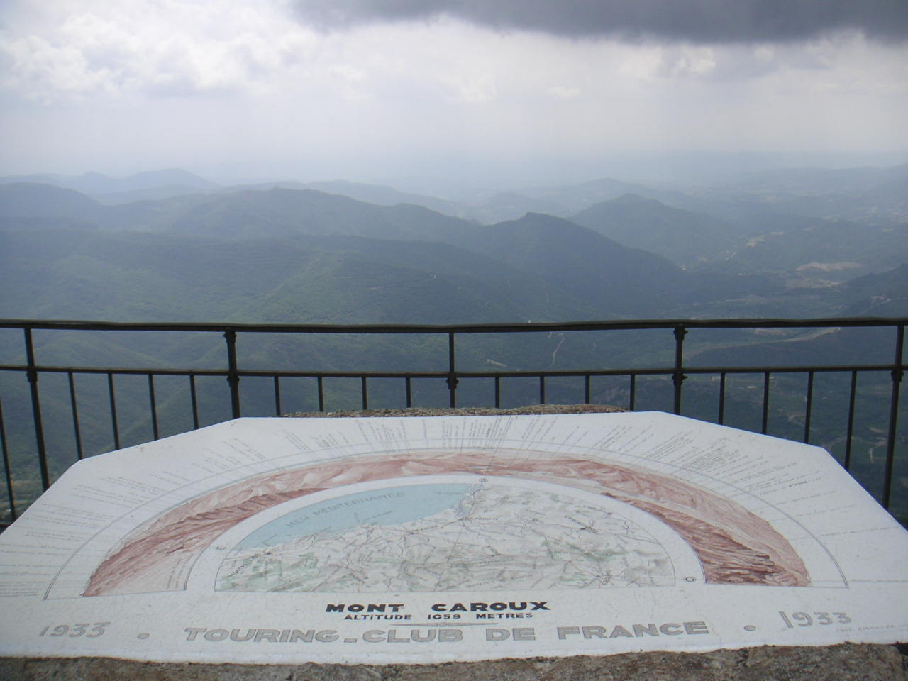 Description : La table d'orientation posée par le Touring-Club de France au sommet du Mont Caroux. Source : Photo personnelle - TouN - libre de droit Prise le : 12 août 2004